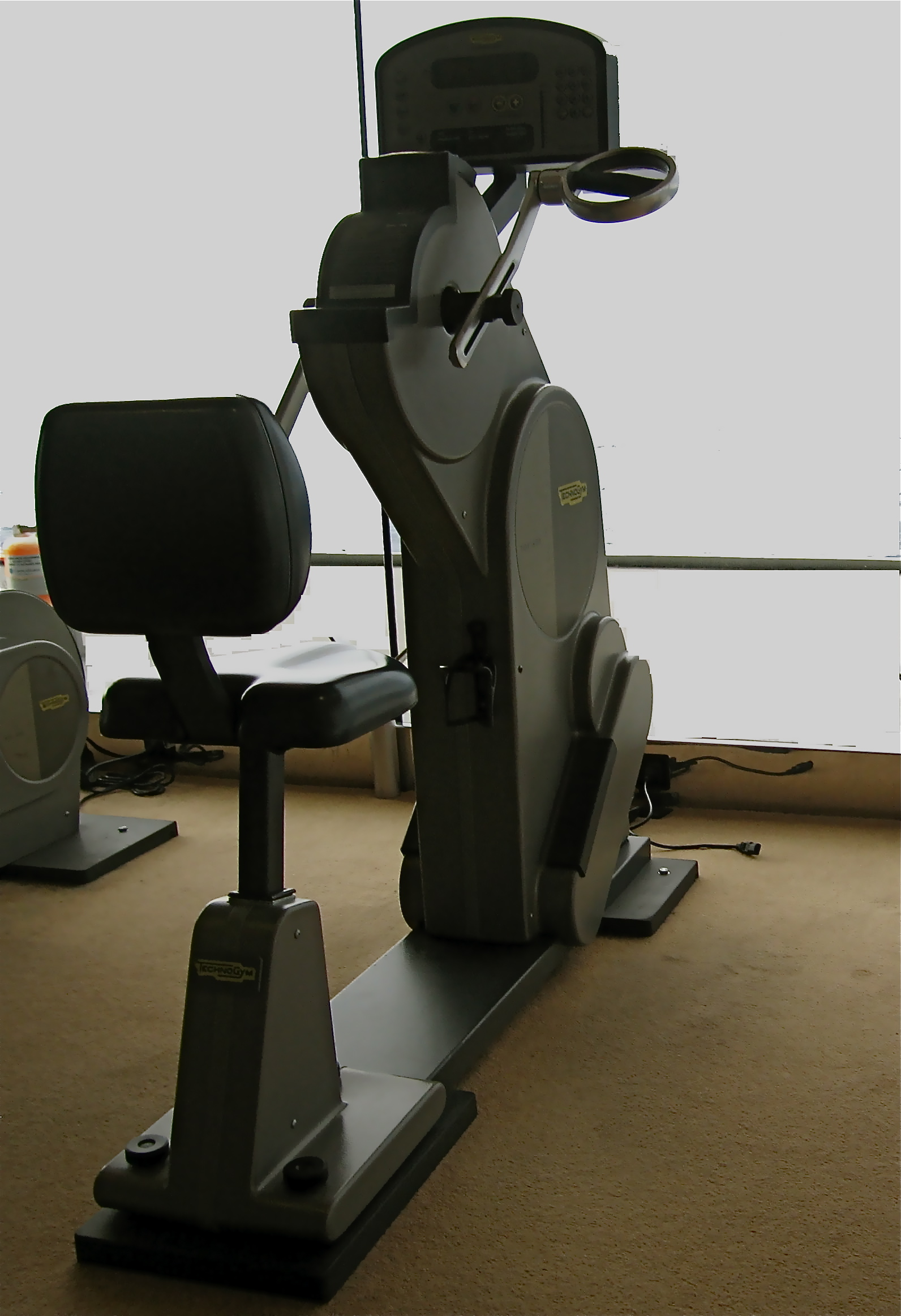 Handkurbelergometer der Fa. Technodyn